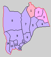 静岡県庵原郡の町村。